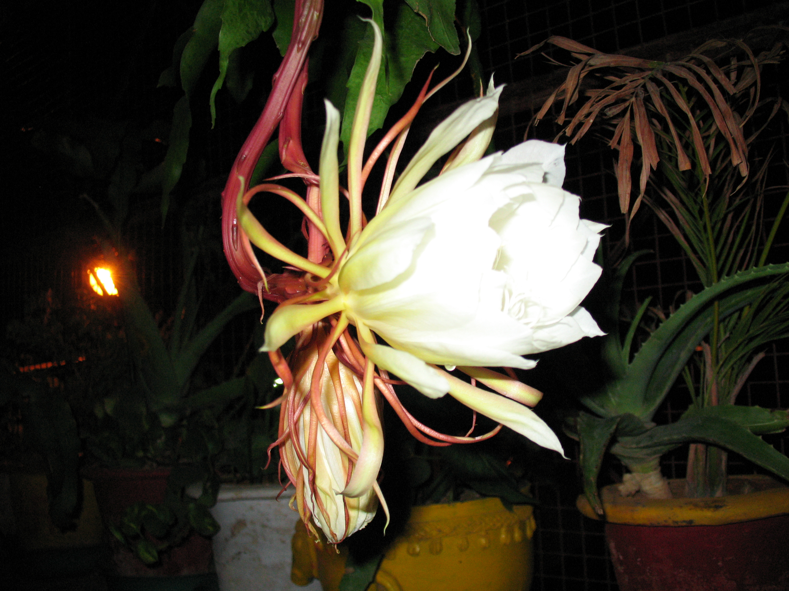 Nishagandhi